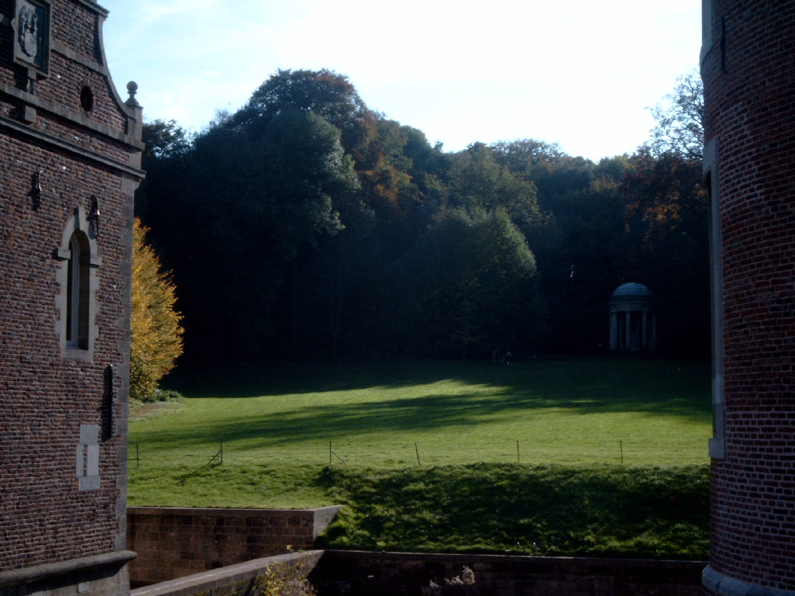 Engels Park met Minervatempel te Alden Biesen (zie plan nr 12)